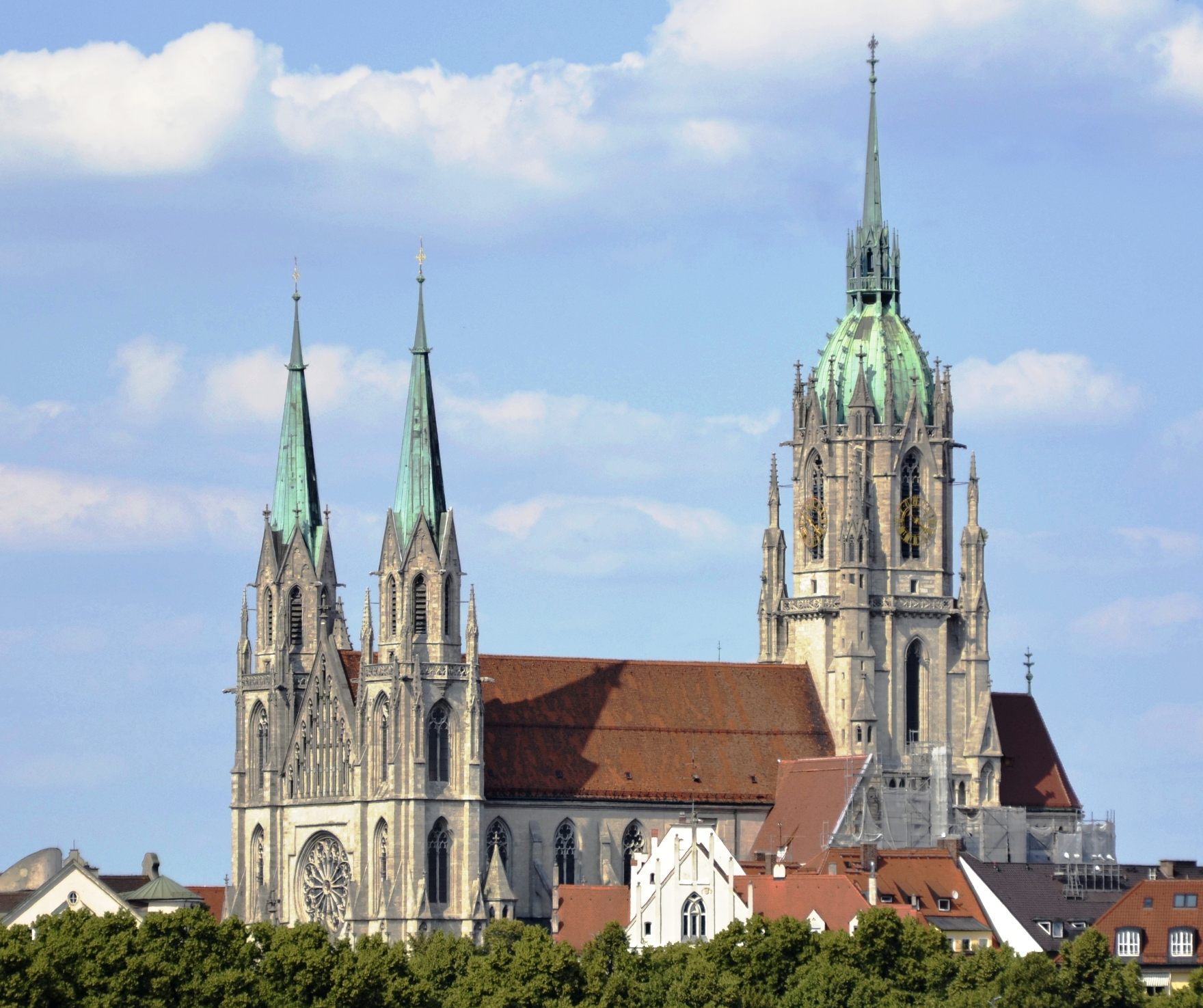 St. Paul in der Maxvorstadt in München, Bayern.